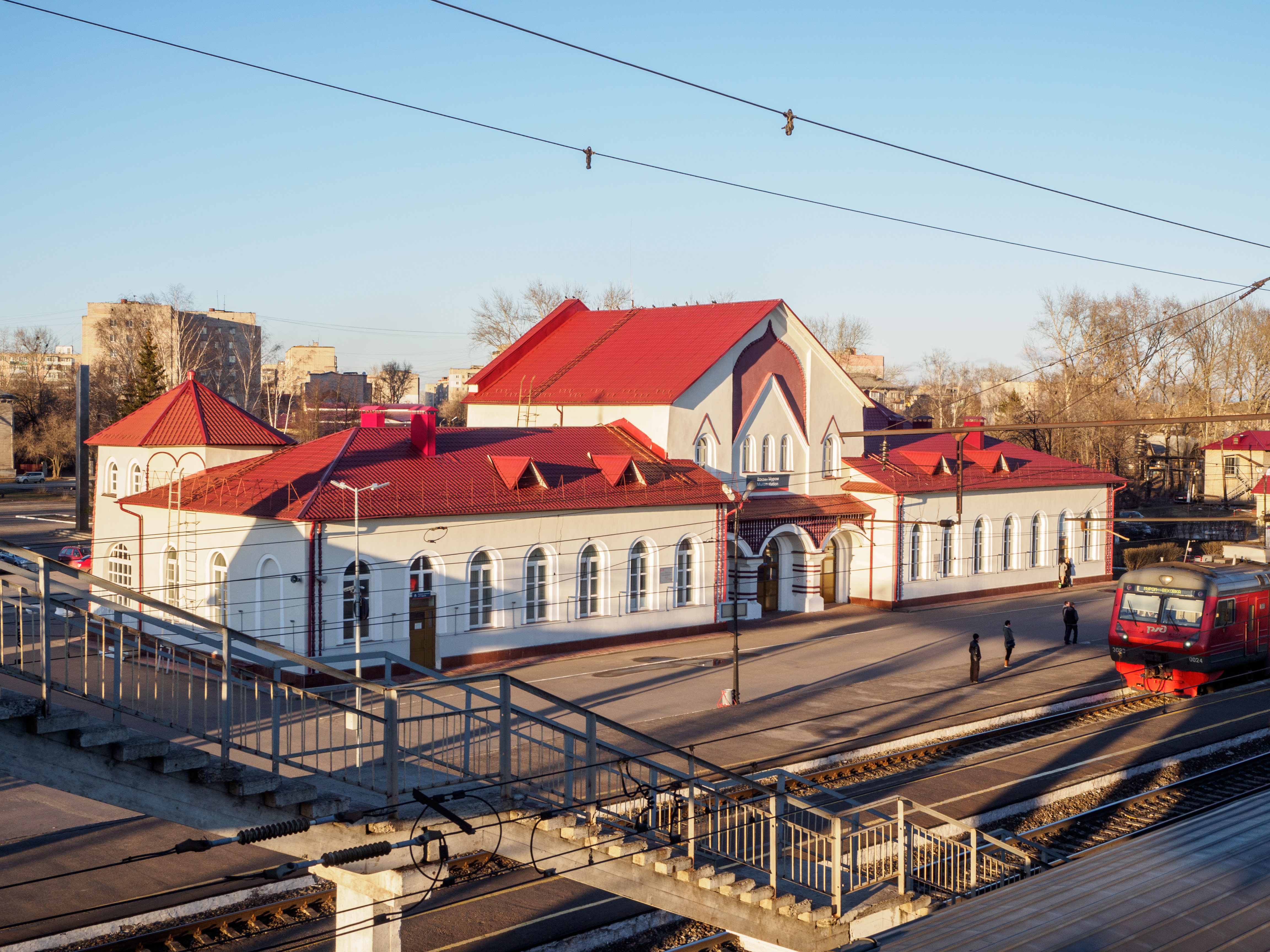 Вокзал железнодорожный: улица Привокзальная, 1, Муром, Владимирская область